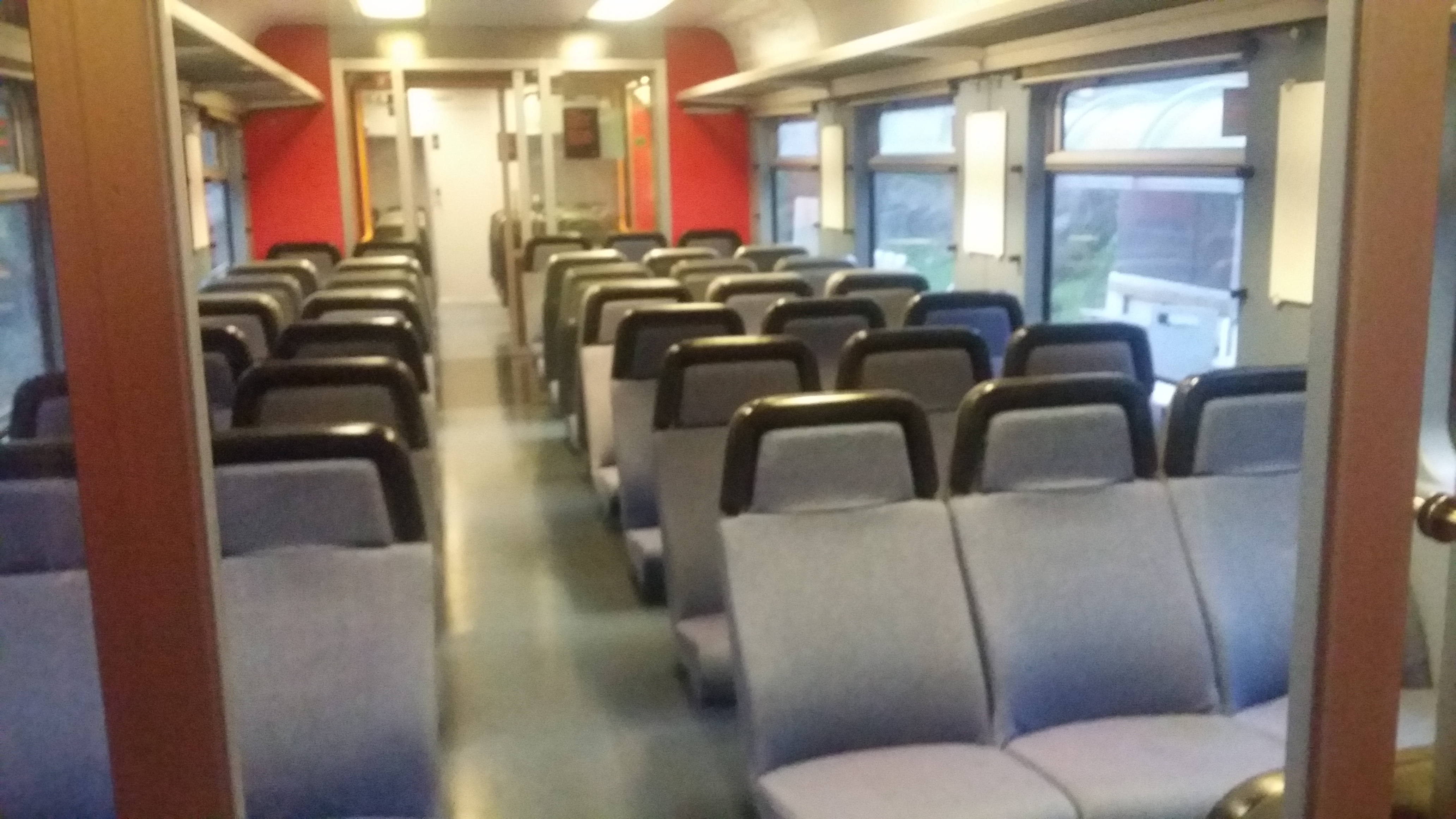 Interiør i BS 69.657